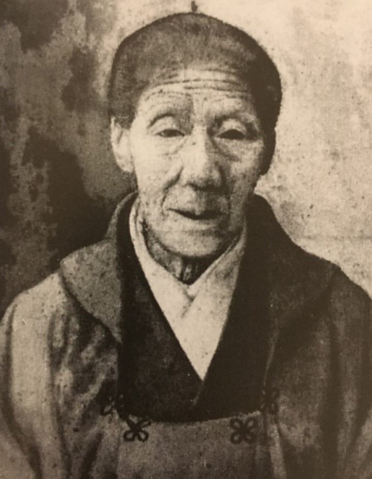 沖田みつの肖像写真。